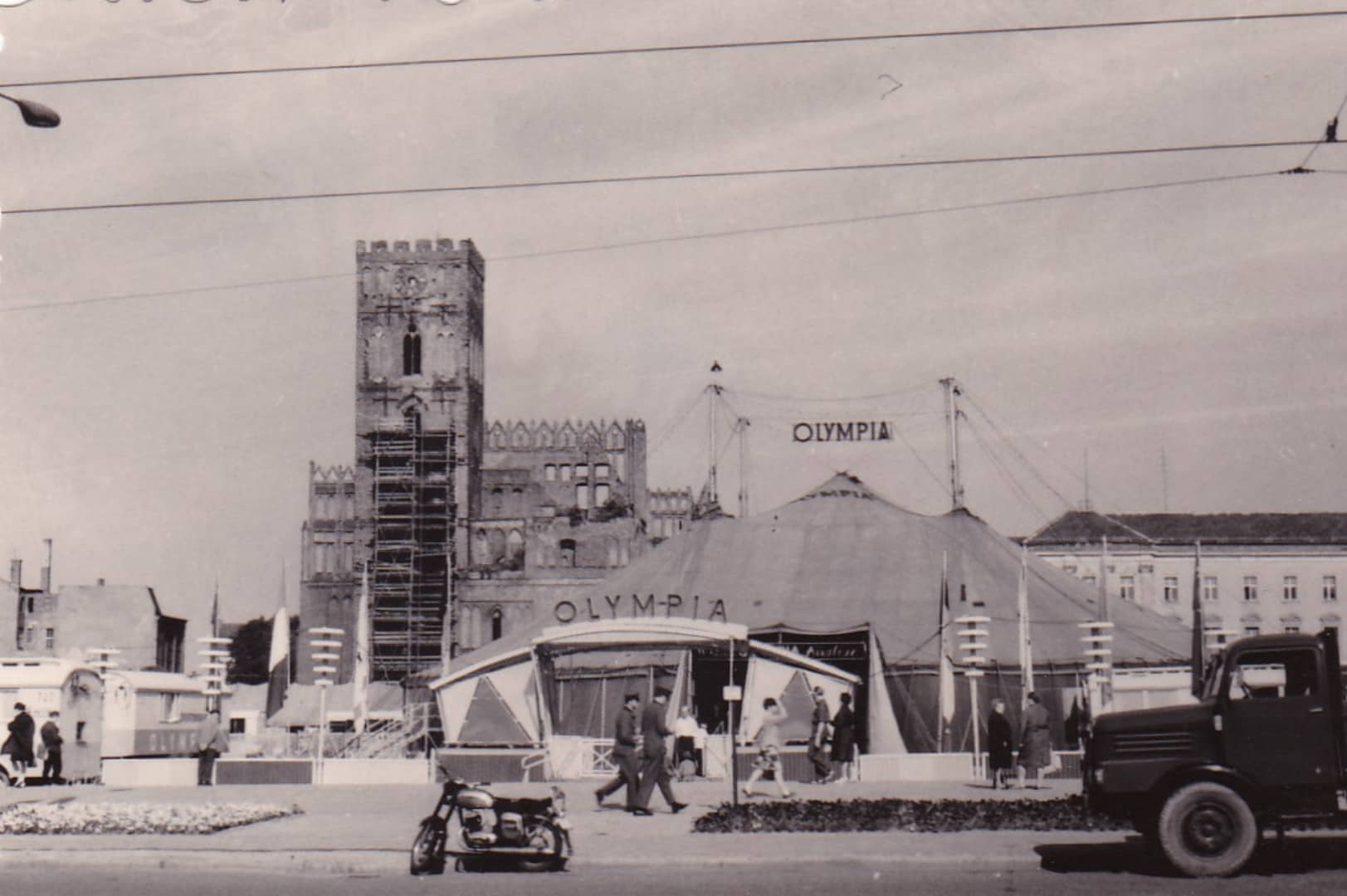 Zirkus Olympia auf dem heutigen Brunnenplatz an der Karl-Marx-Str., Frankfurt (Oder)